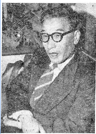 서울시장 시절 허정